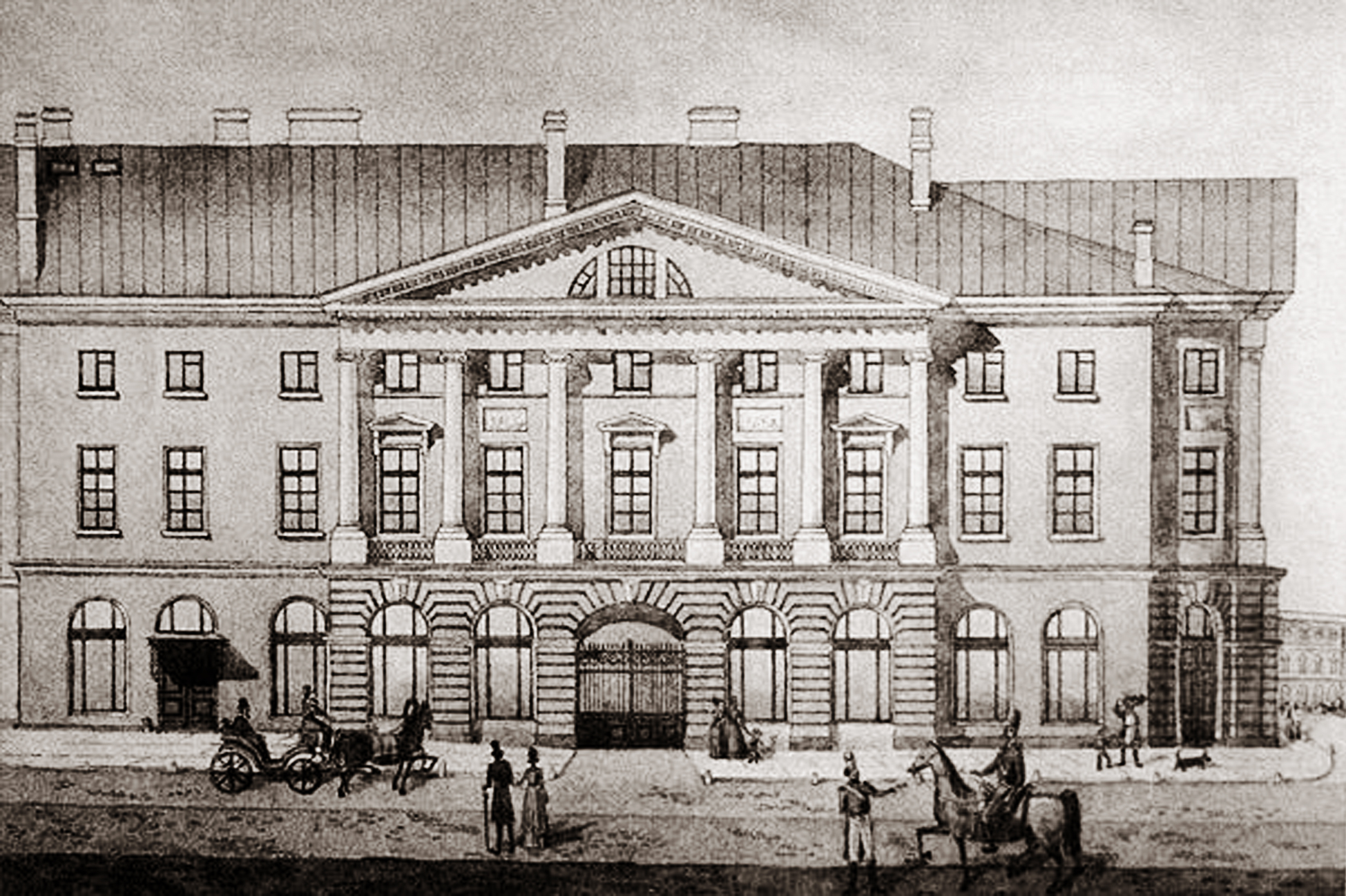 Дом с четырьмя колоннадами. Работа неизвестного художника.